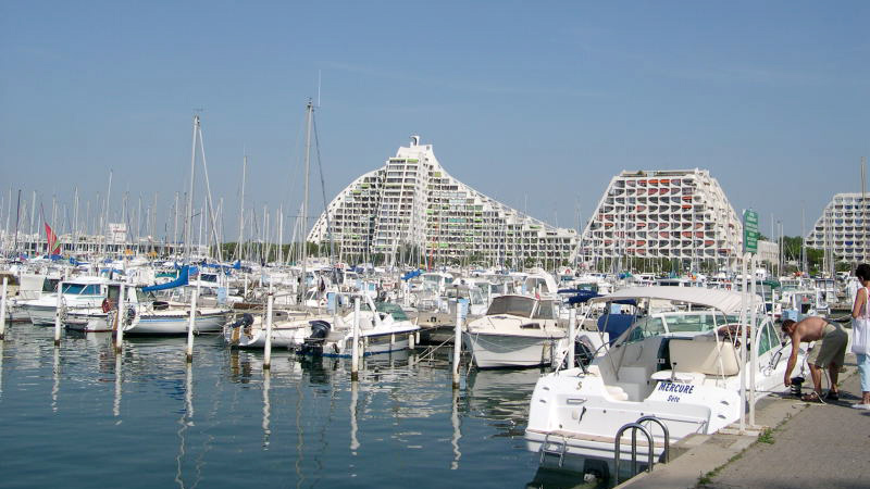 Le port de La Grande-Motte et la grande pyramide